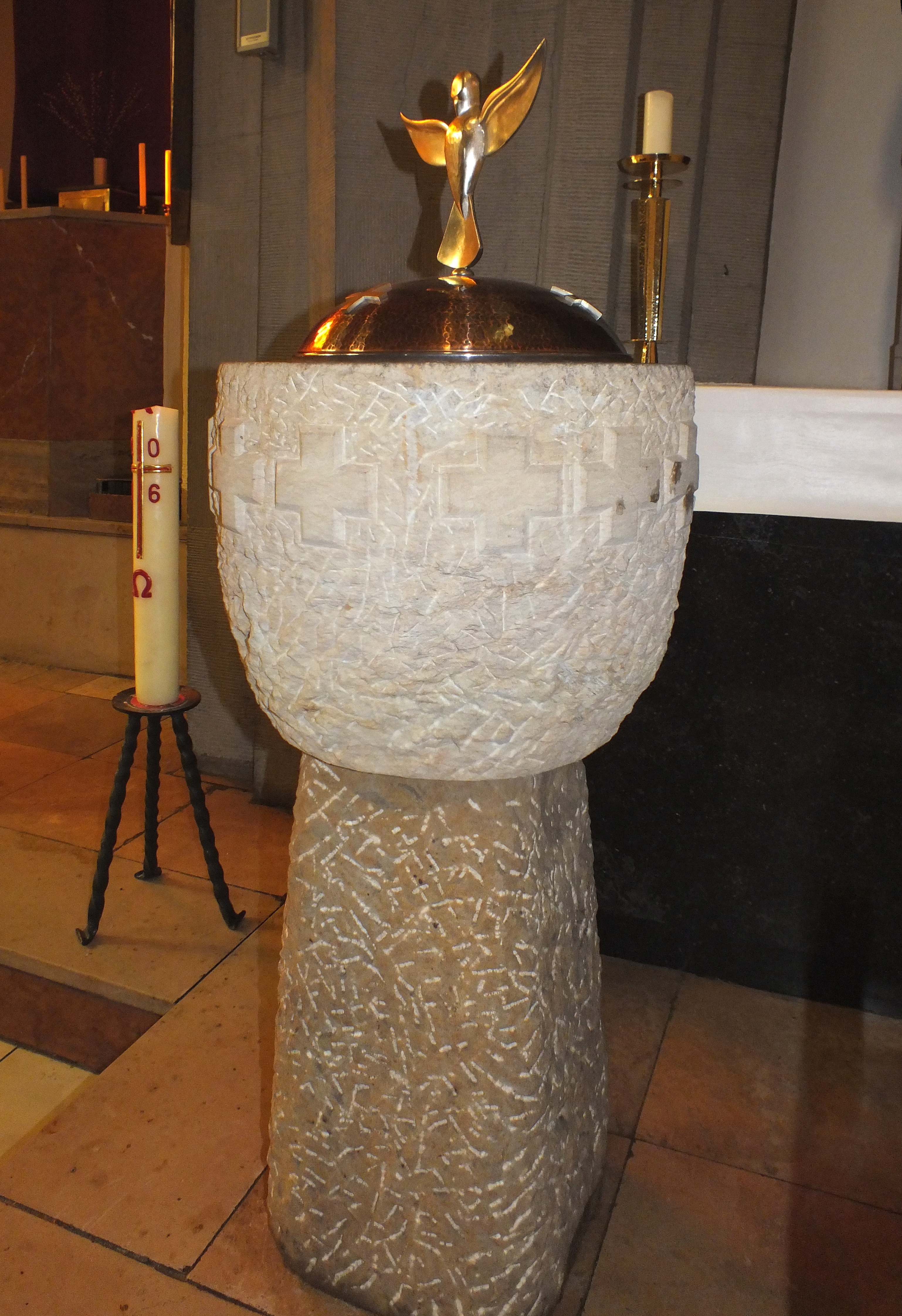 katol. Kirche Maria Magdalena, Niederschönhausen: Taufe mit Deckel